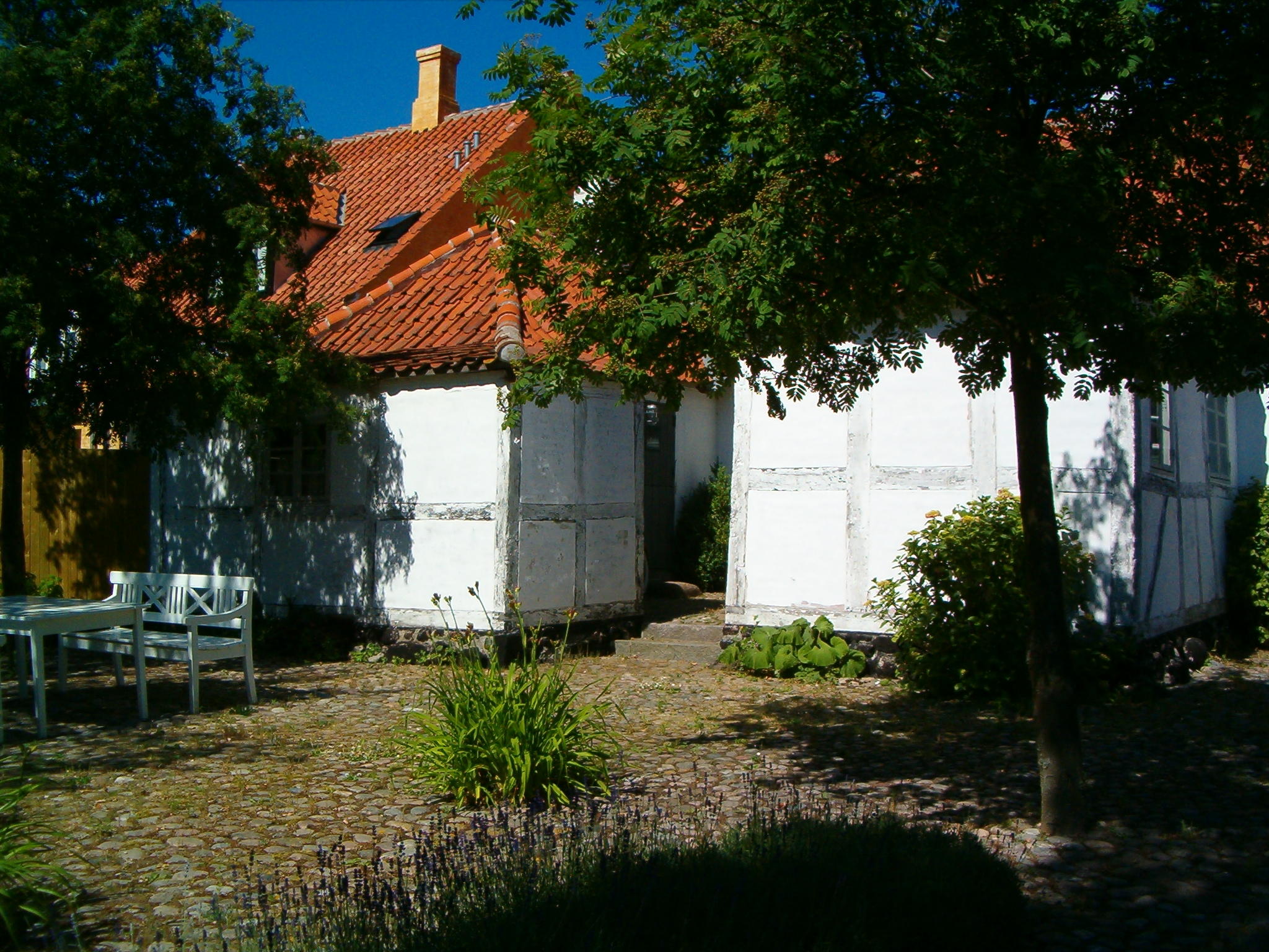 Aarestrups hus fra gården